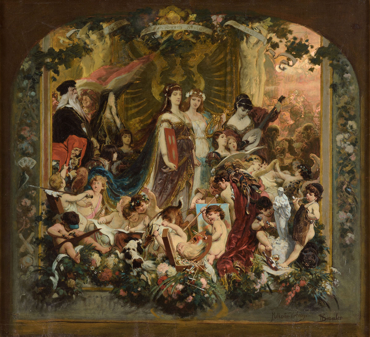 Malkasten-Vorhang. Signiert. Öl/Lwd., 77 x 84 cm